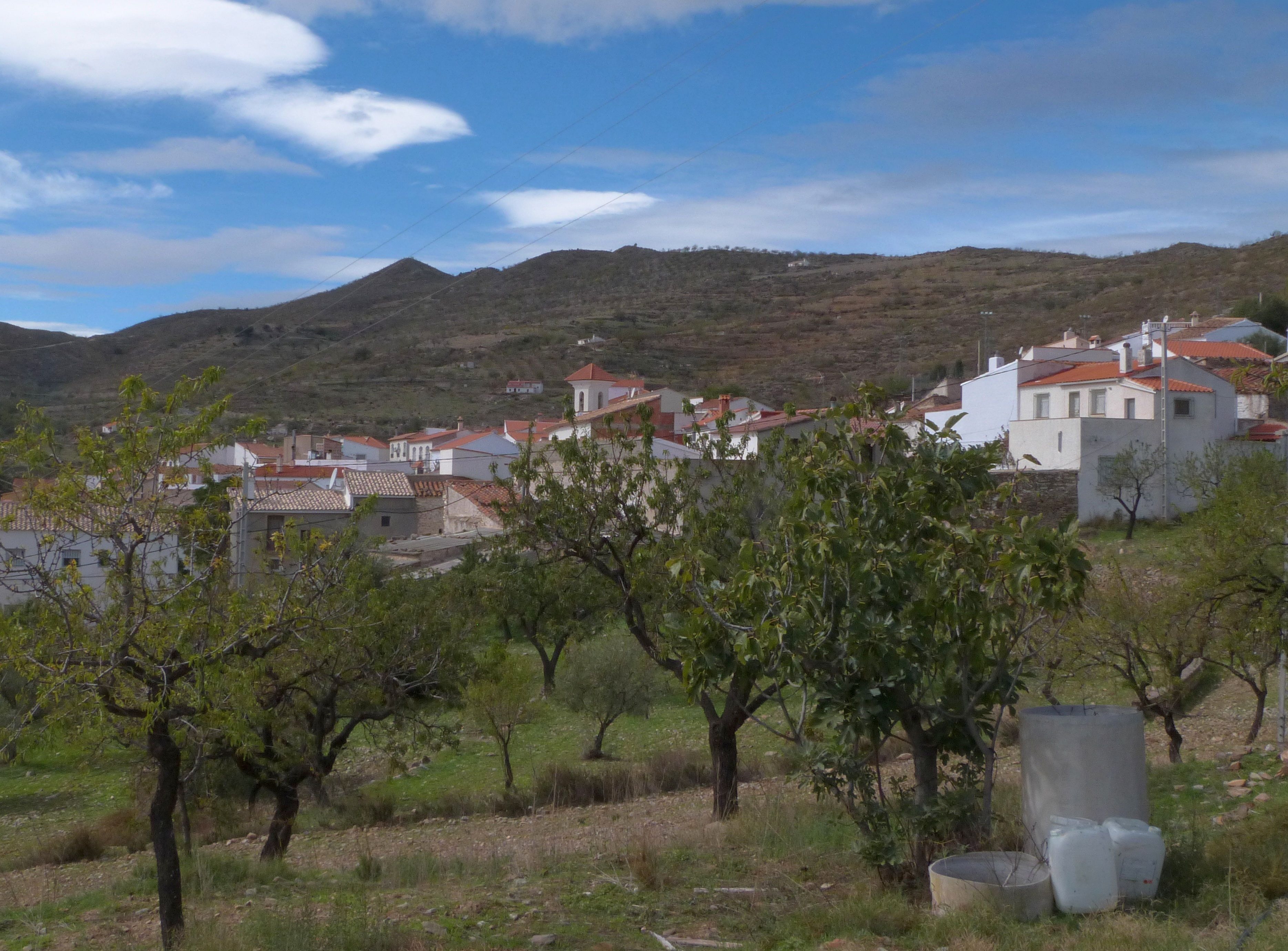 Benizalón